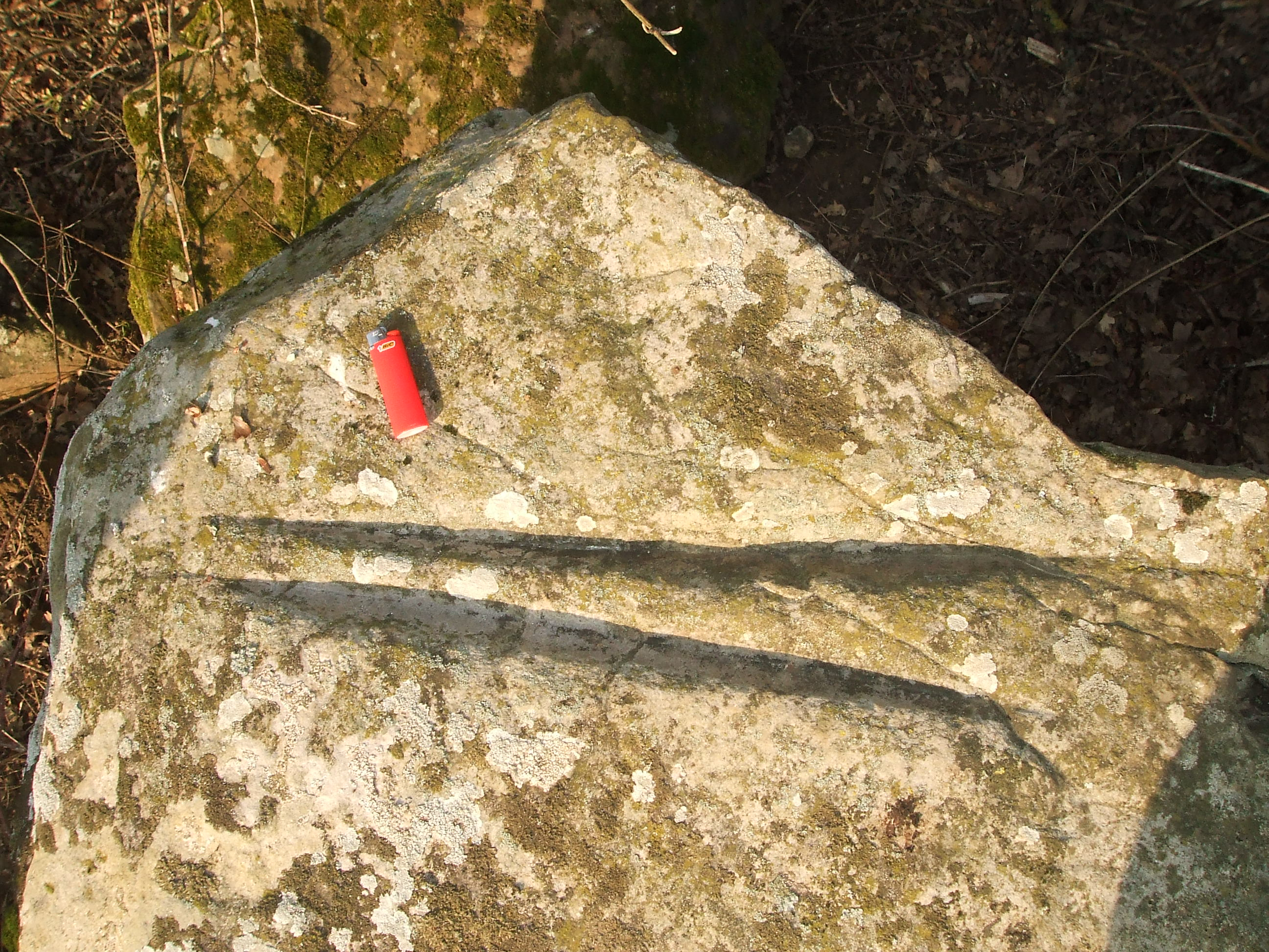 Polissoir néolithique situé près du bourg de Chevry-en-Sereine